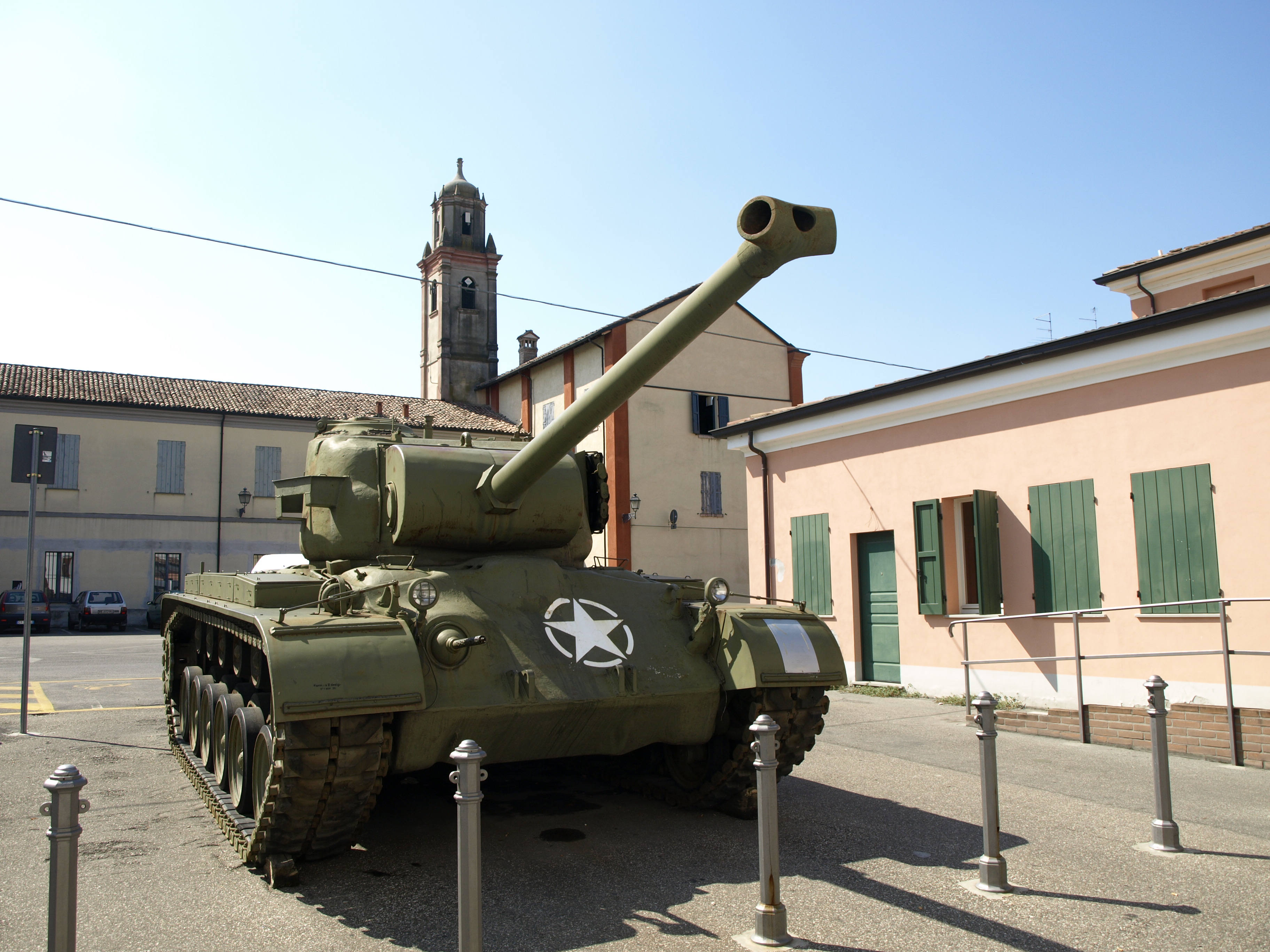 Carro armato M26 Pershing situato nella piazza di Brescello, adiacente al Museo di Beppone e Don Camillo.